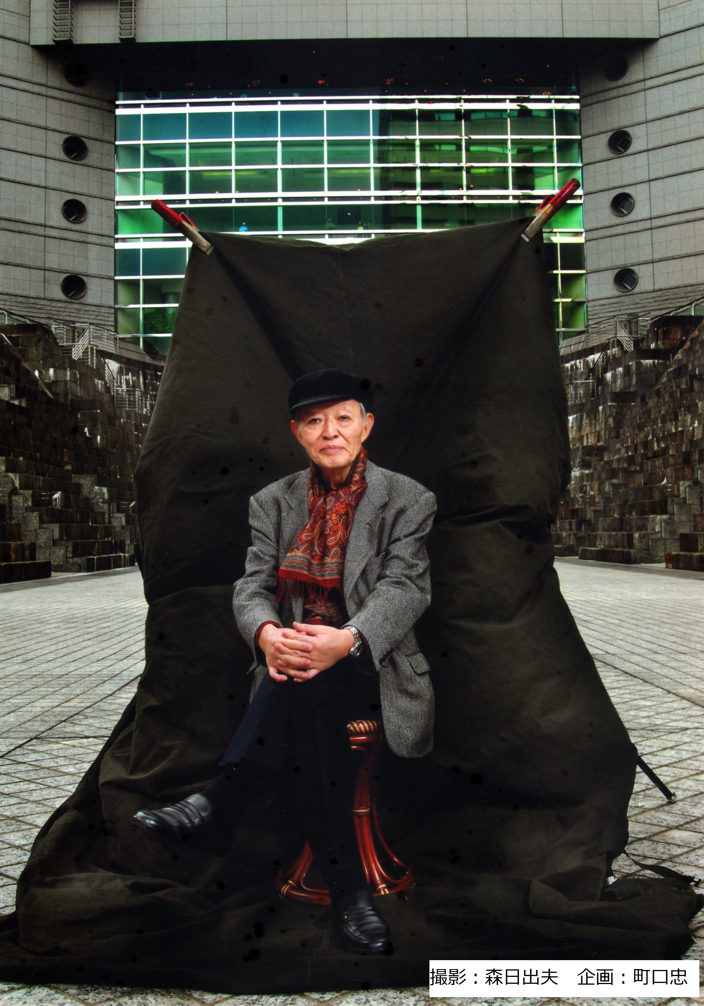 田村明が計画し関係機関と粘り強く交渉し、その後引き継がれ実現した、晩年の田村にとって思い入れ深い「みなとみらい21」の中心部に位置するドックガーデンでの記念写真